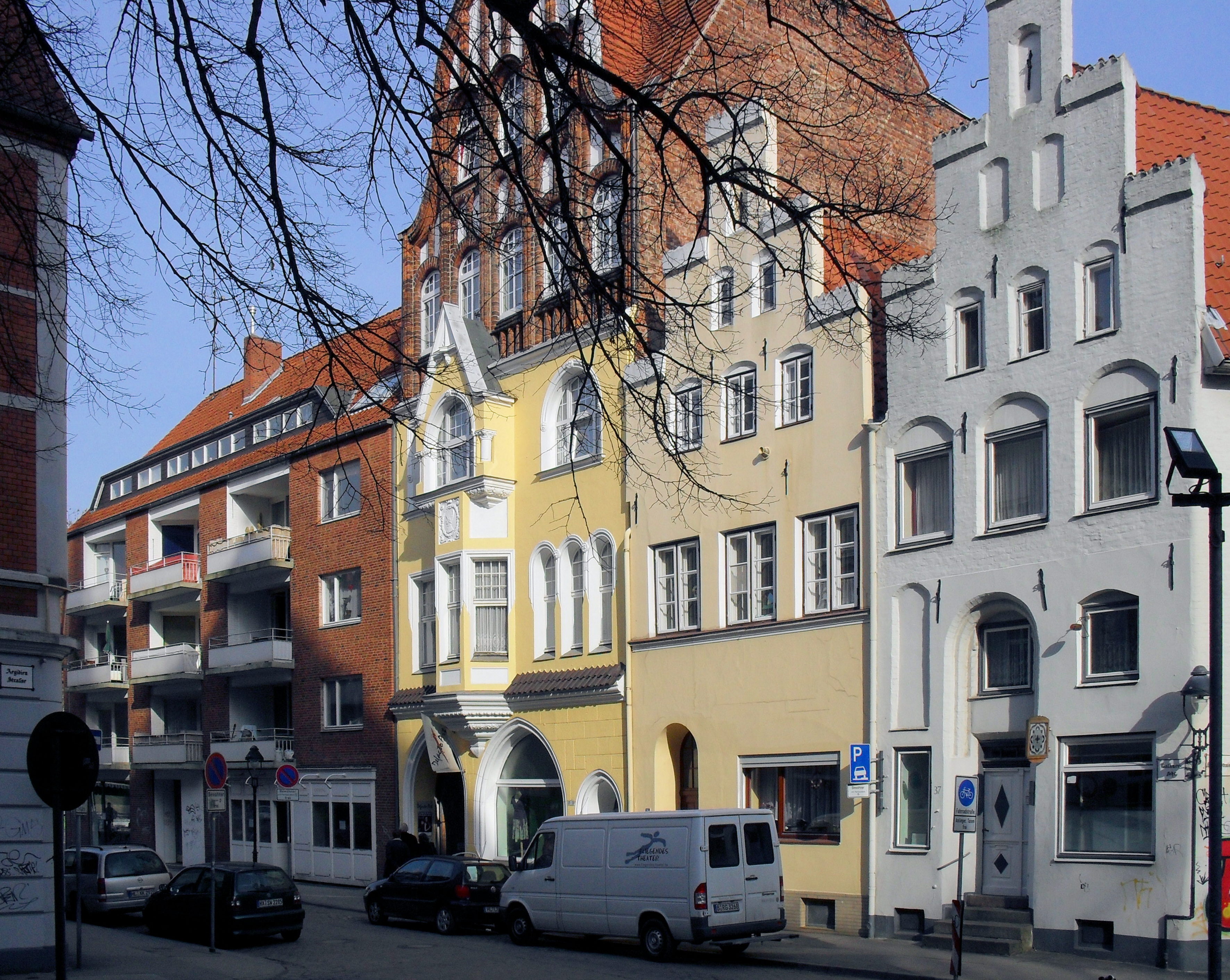 Die Straße Balauerfohr in Lübeck